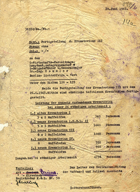 Meldung der Fertigstellung der Krematorien II, III, IV, V in Auschwitz-Birkenau und Angabe der Leistungsfähigkeit bei 24 Stunden Betrieb